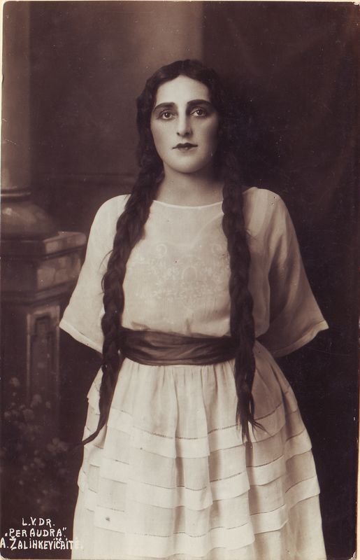 Elena Žalinkevičaitė-Petrauskienė (1900 m. rugsėjo 23 d. Padustėlis, Dusetų valsčius, Rusijos imperija – 1986 m. gegužės 23 d. Vilnius) – aktorė, poetė, dramaturgė. Fotografijoje Elena Žalinkevičaitė - Romutės vaidmuo Juozo Tarvydo pjesėje "Per audrą".